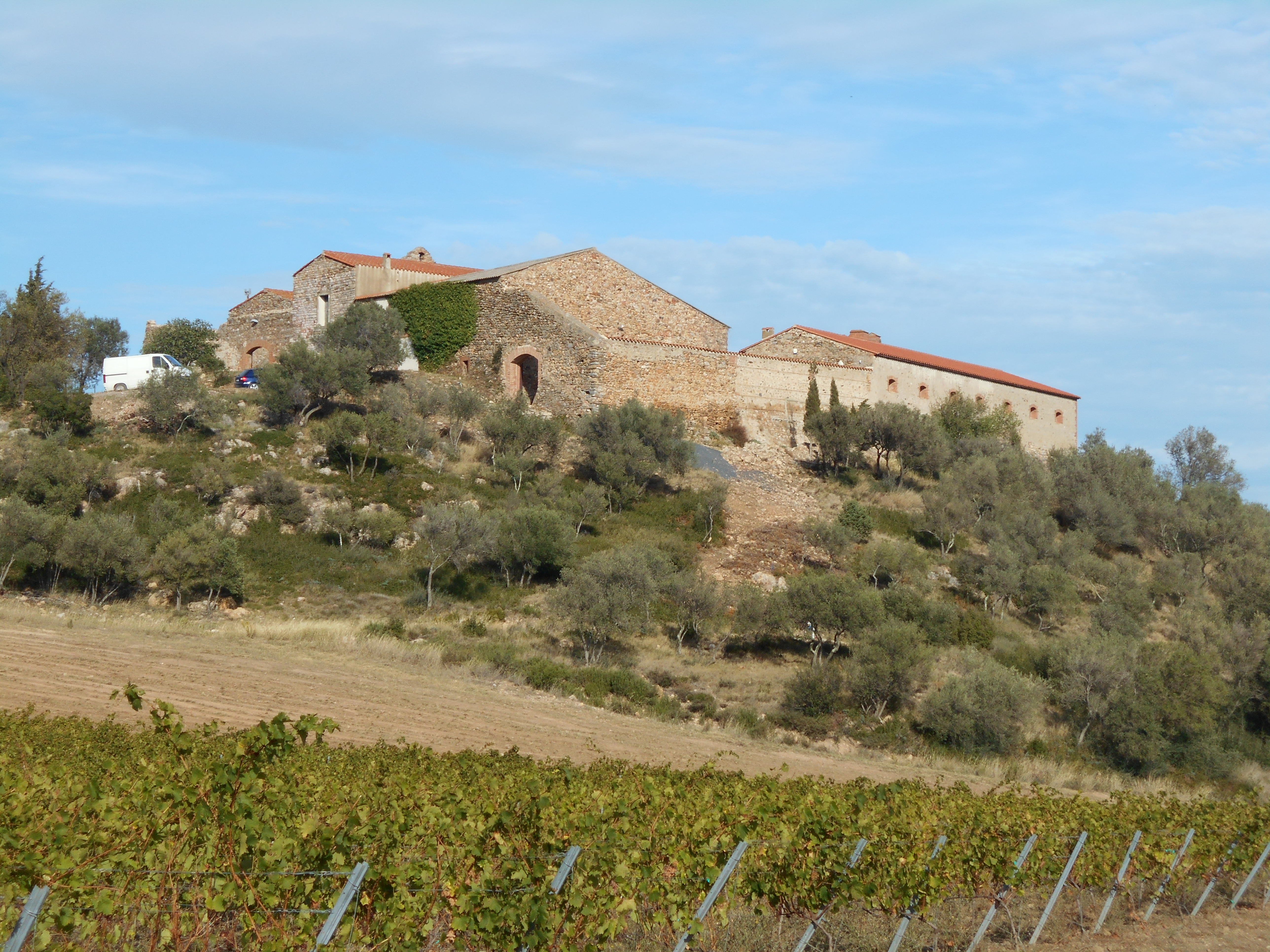 El Castell de les Fonts des del nord-oest